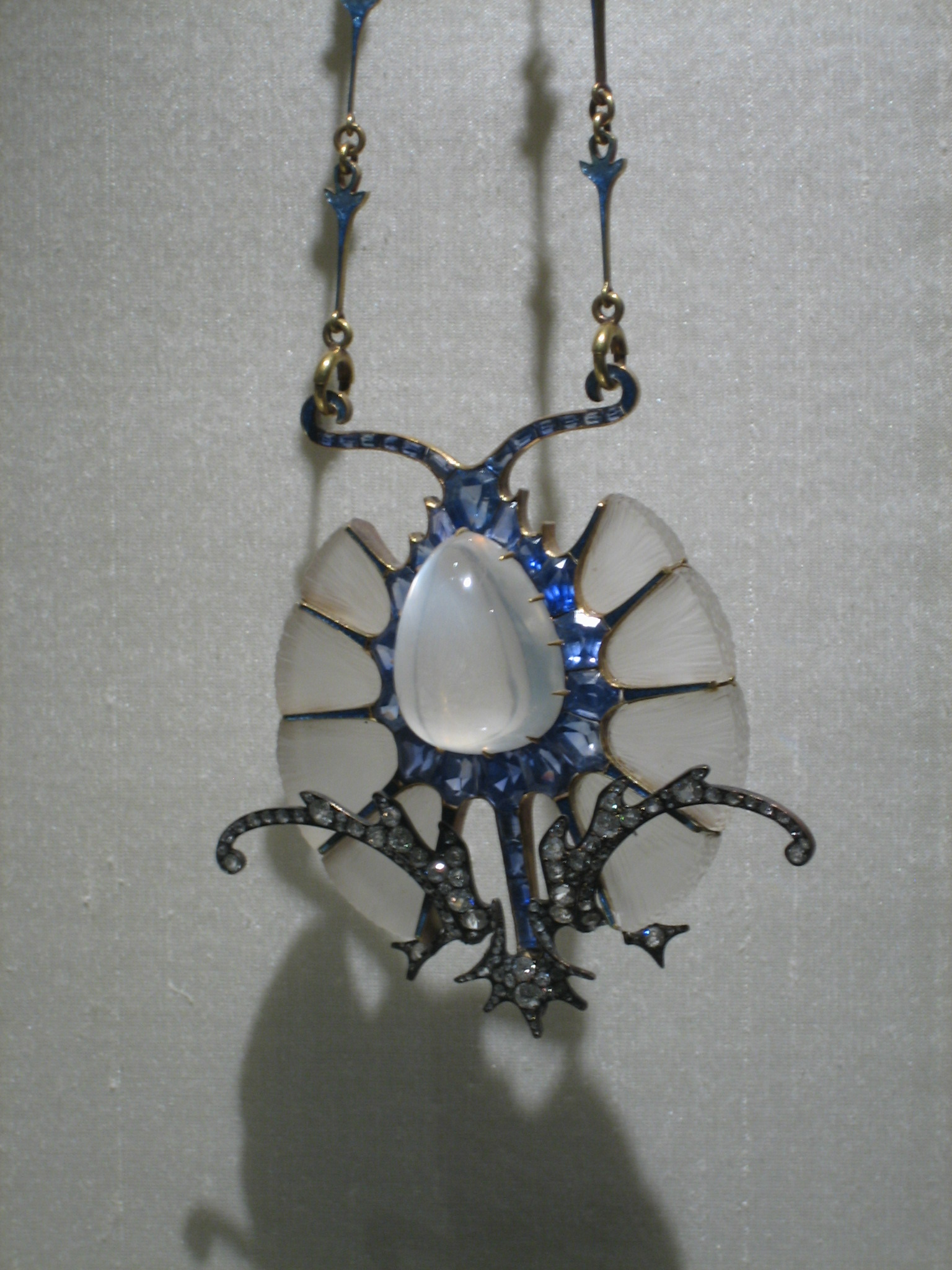 Lalique "Thistle" pendant